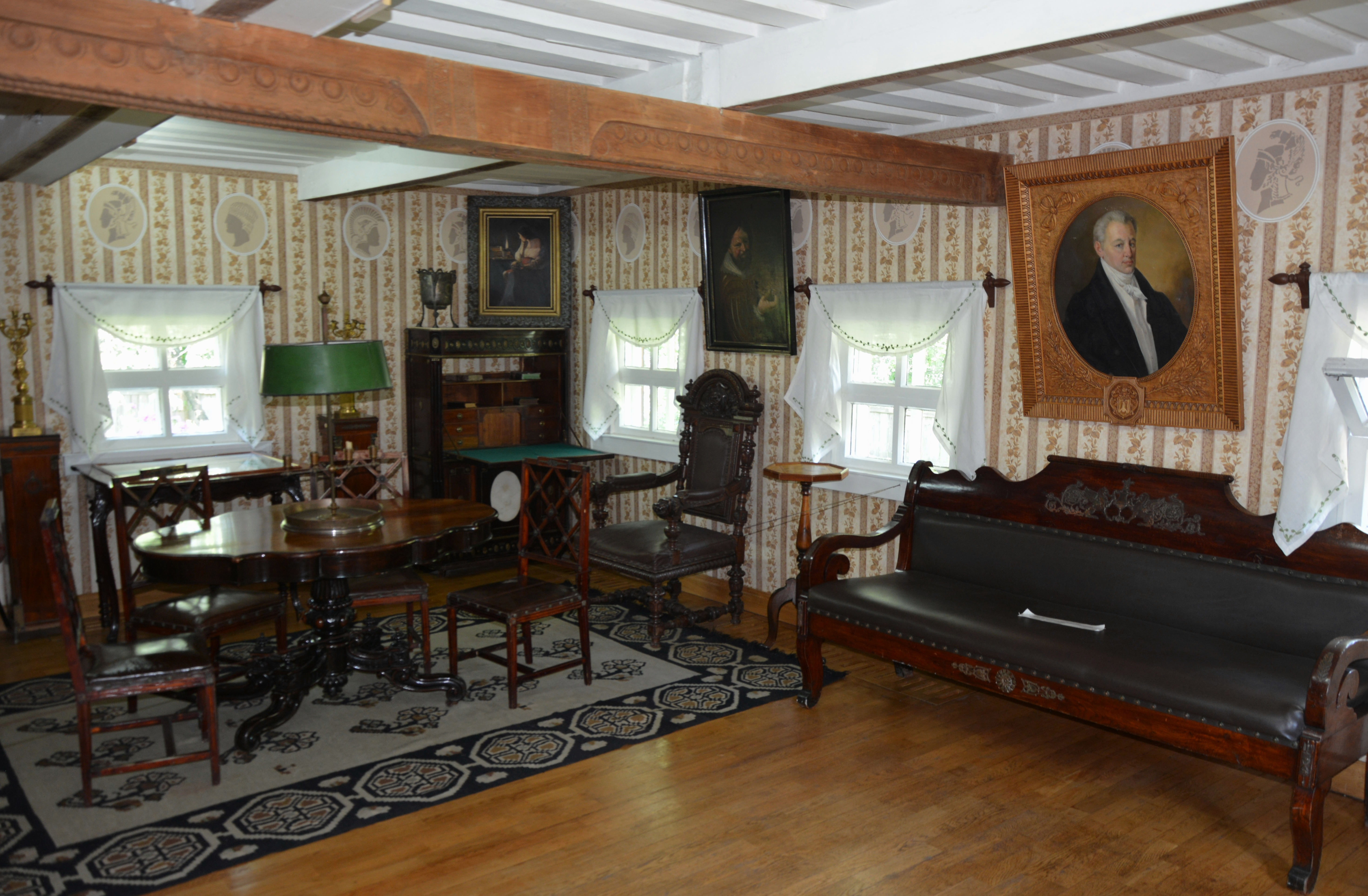 Хата (Музей-садиба Івана Котляревського), Полтава, Соборна площа, 3